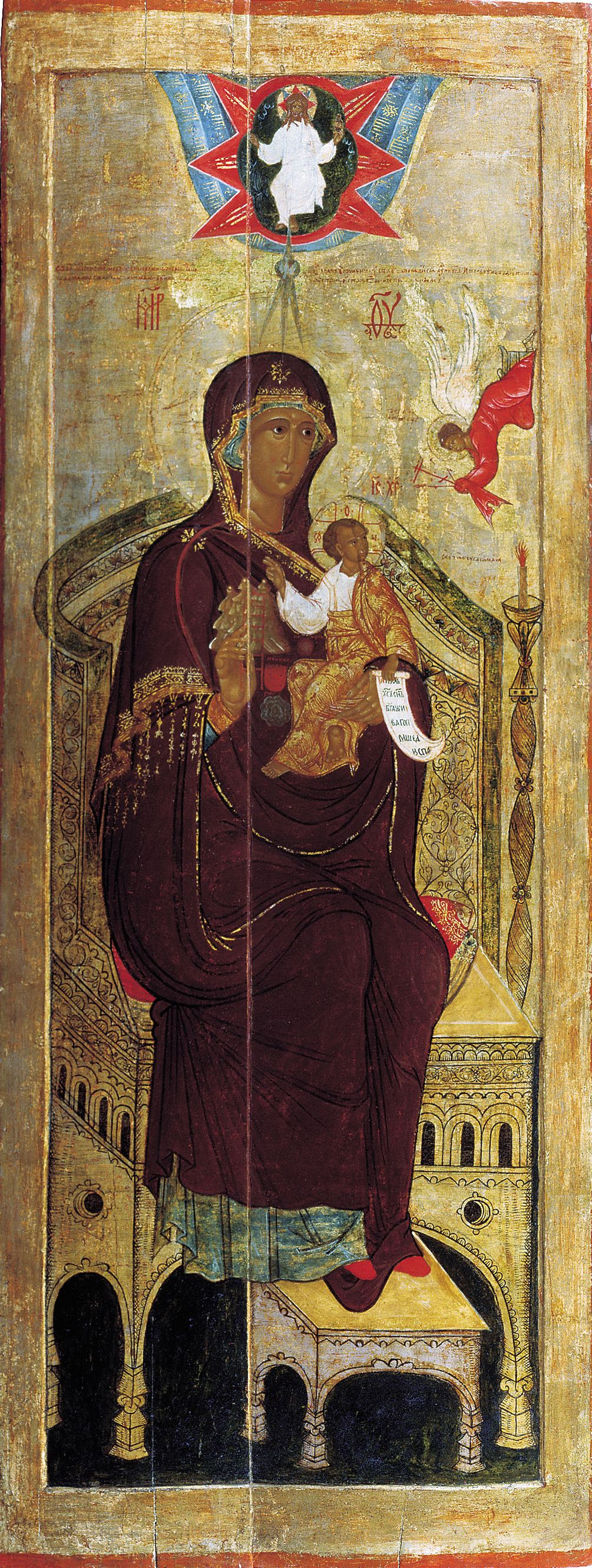 Богоматерь Гора Нерукосечная